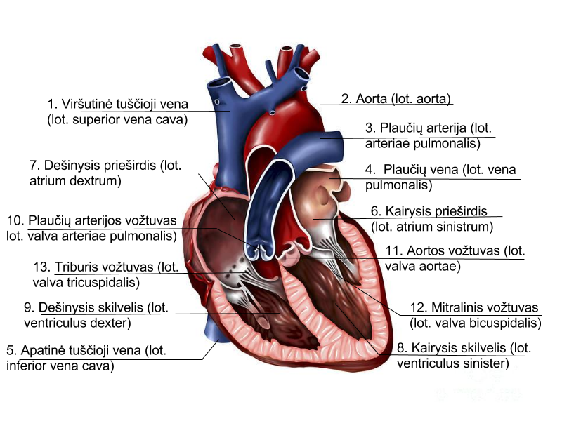 Širdis ir jos dalys lietuvių ir lotynų kalba.